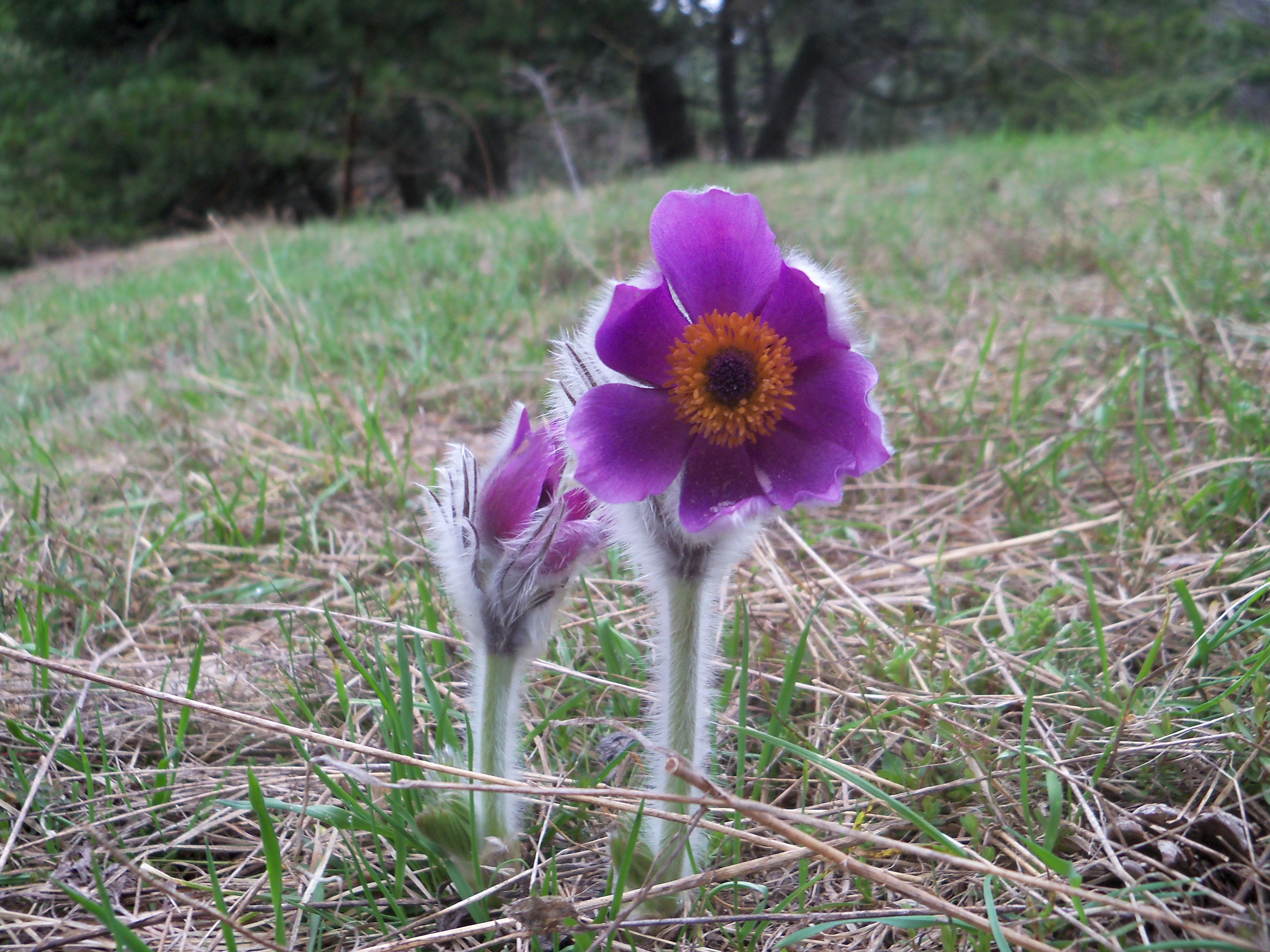 Сон-трава